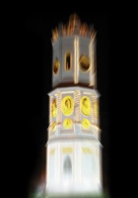 Tour de l'horloge de l'hotel de ville de Sari, Mazandaran, Iran. مازِرونی: Sari re gat meydun, Sari, Mazandaran.